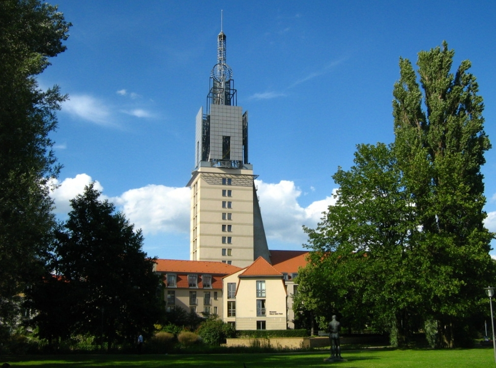 Auf der Freundschaftsinsel in der Havel in Potsdam. Blick auf den Neubau anstelle der alten Heiliggeistkirche.